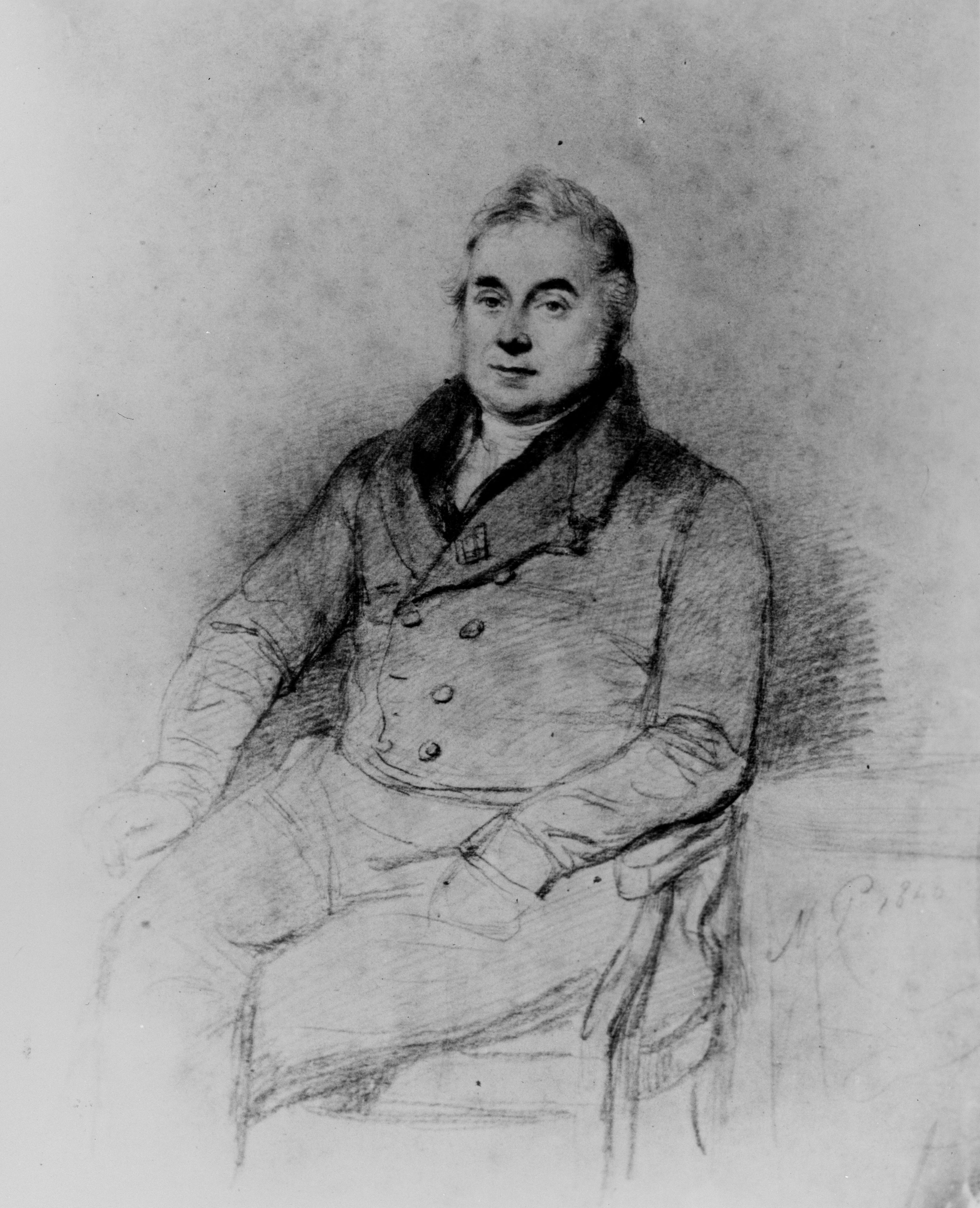 Portret van Willem Daniel Cramer (1788-1856)